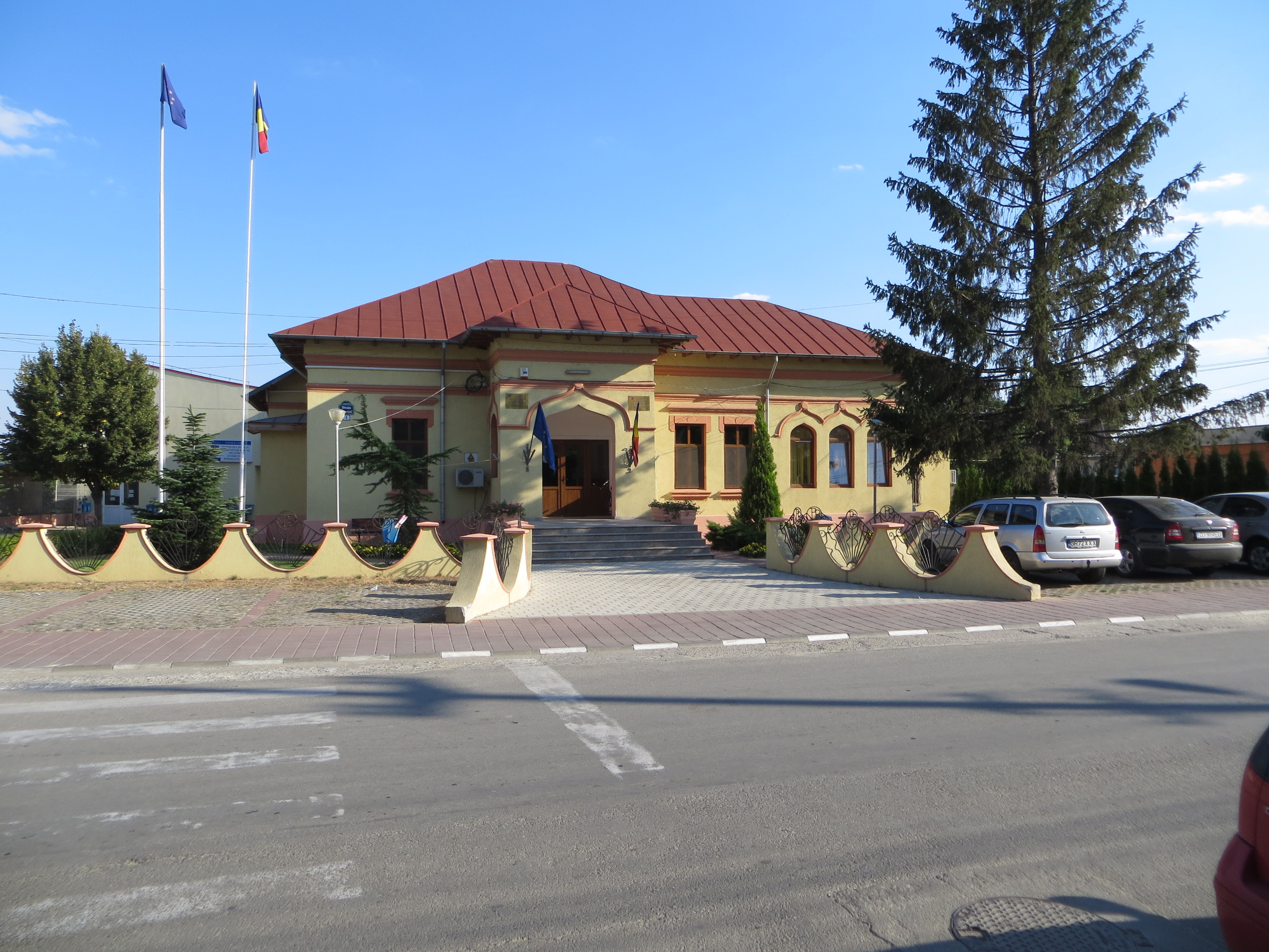 Pretura, azi Primăria